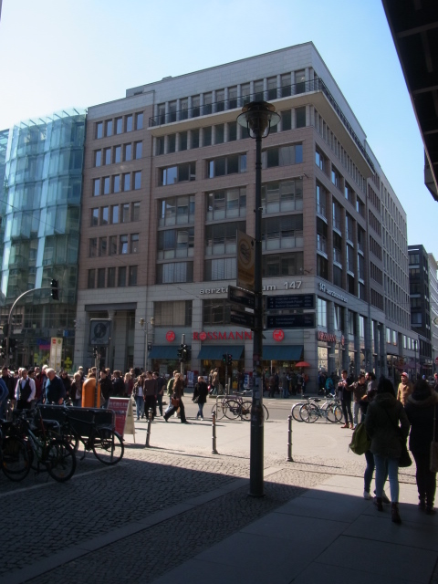 Ansicht des Eckhauses Friedrichstraße/Georgenstraße in Berlin (Standort des ehemaligen Central-Hotels).